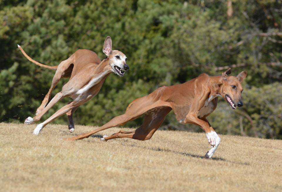 Azawakh leker